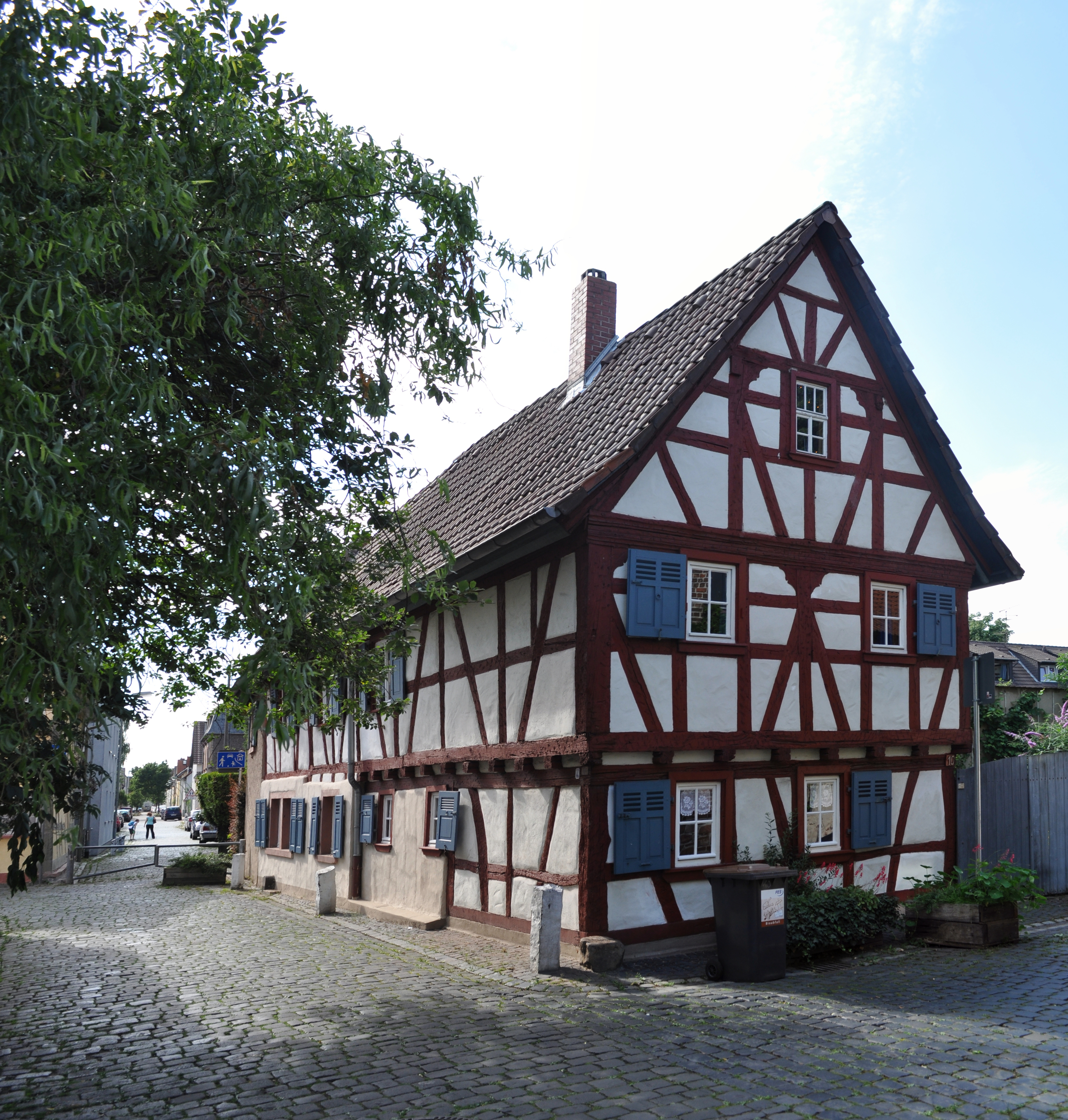 Frankfurt-Schwanheim, Vierhäusergasse 10